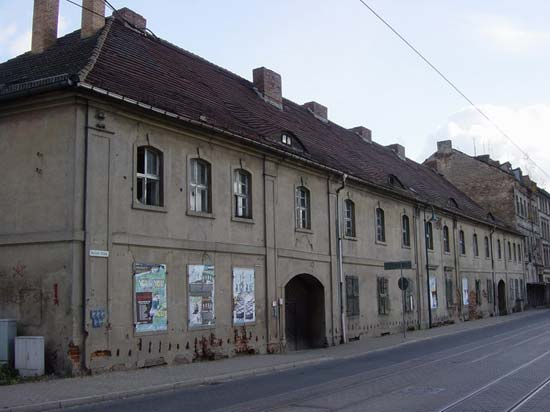 Ehemaliges Georgenhospital Frankfurt (Oder) im Jahr 2008